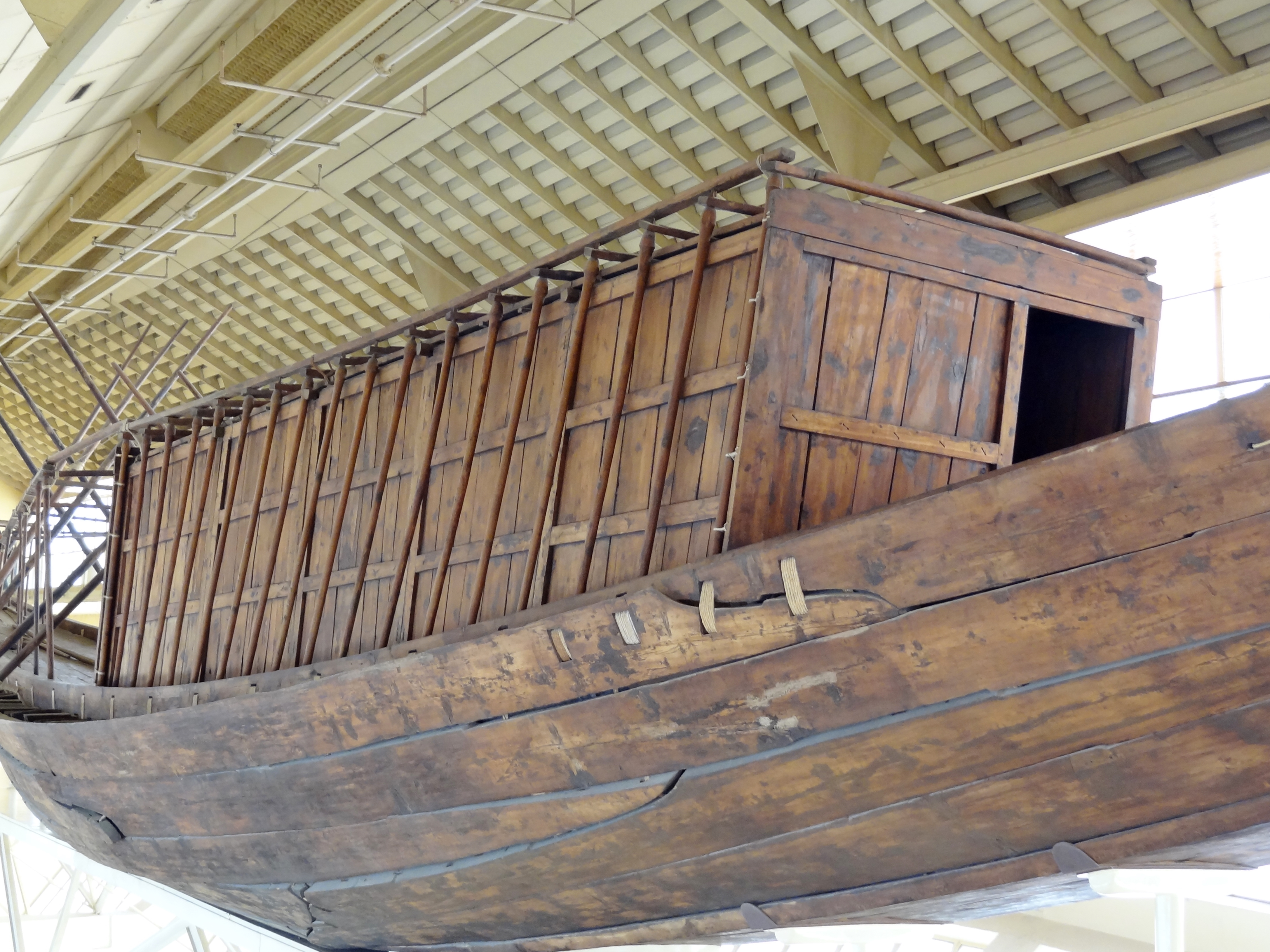 Sonnenbarke des Cheops im Museum neben der Cheops-Pyramide in Giseh, Ägypten